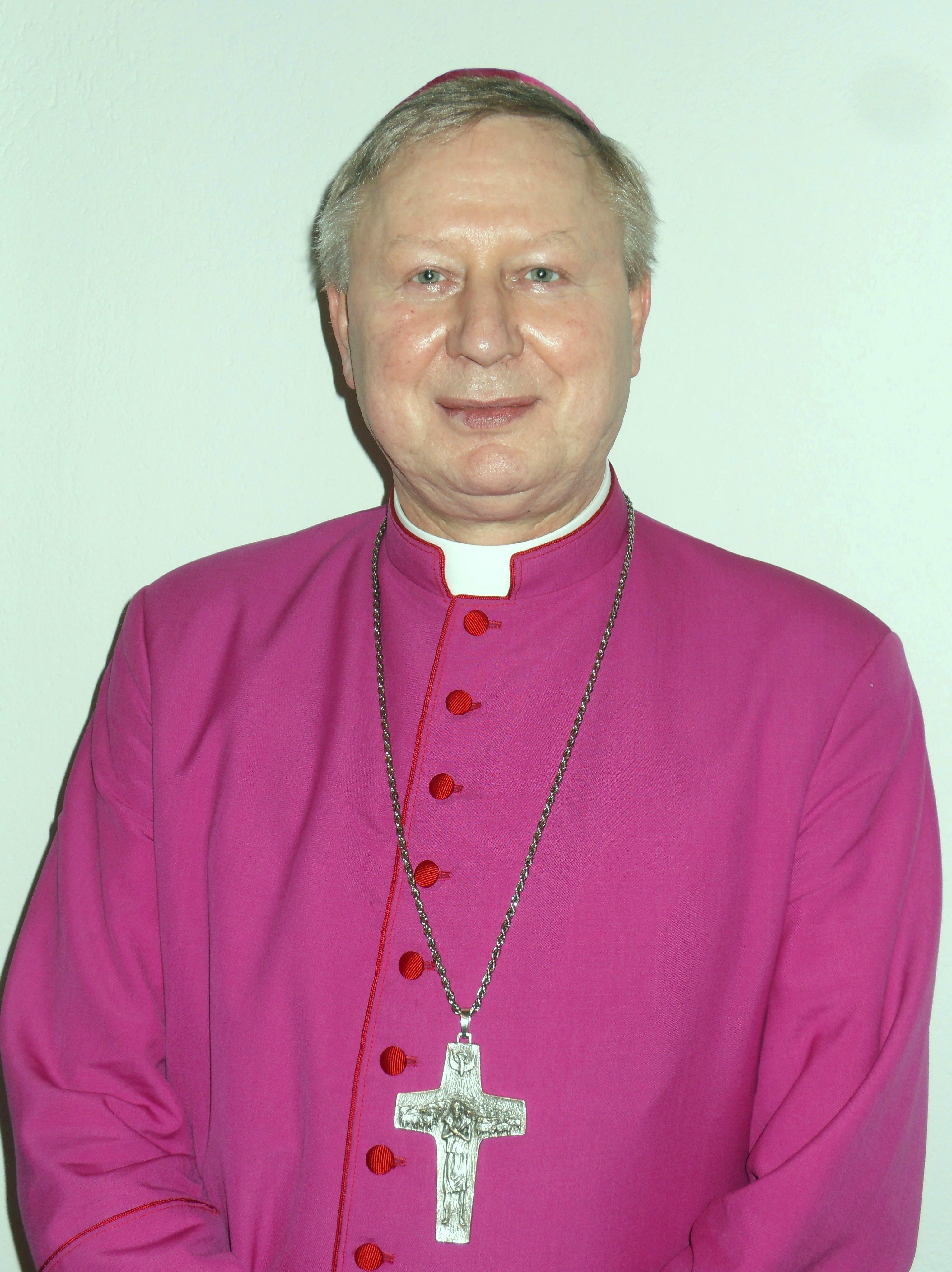 Ks. dr Wiesław Szlachetka, gdański biskup pomocniczy.